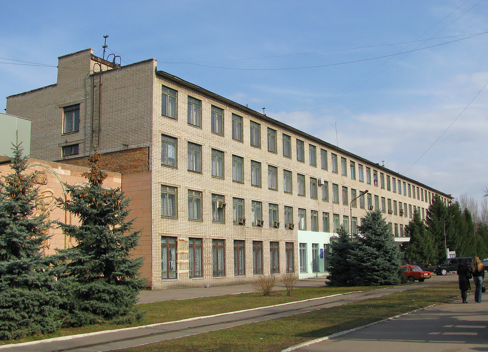 Здание Никопольского техникума Днепропетровской Национальной металлургической академии Украины